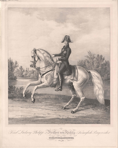 Karl Ludwig Philipp von Kesling par Albrecht Adam